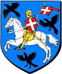 Blason de Mutzig. Il y ait représenté le saint patron de la paroisse qui est Saint Maurice sur son cheval, portant une armure et un étendard.